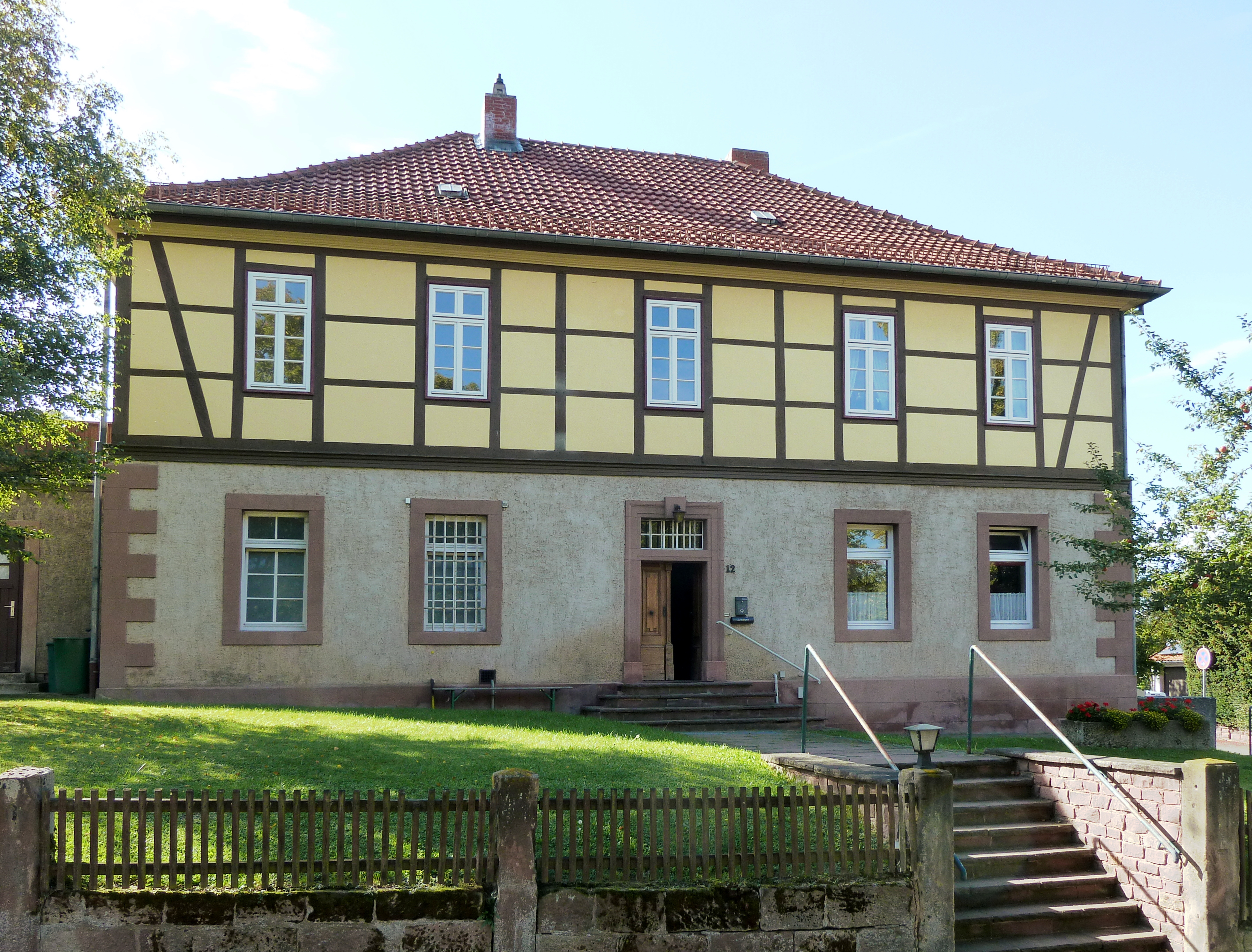 Ehemaliges Gerichtshaus des Amtsgerichts Friedland in Friedland, Südniedersachsen. Erbaut um 1820, Gerichtssitz bis 1859